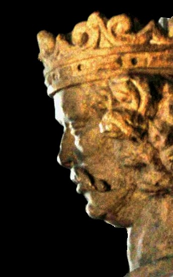 Władysław Łokietek tomb effigy in Kraków author-Maciej Szczepańczyk user:Mathiasrex